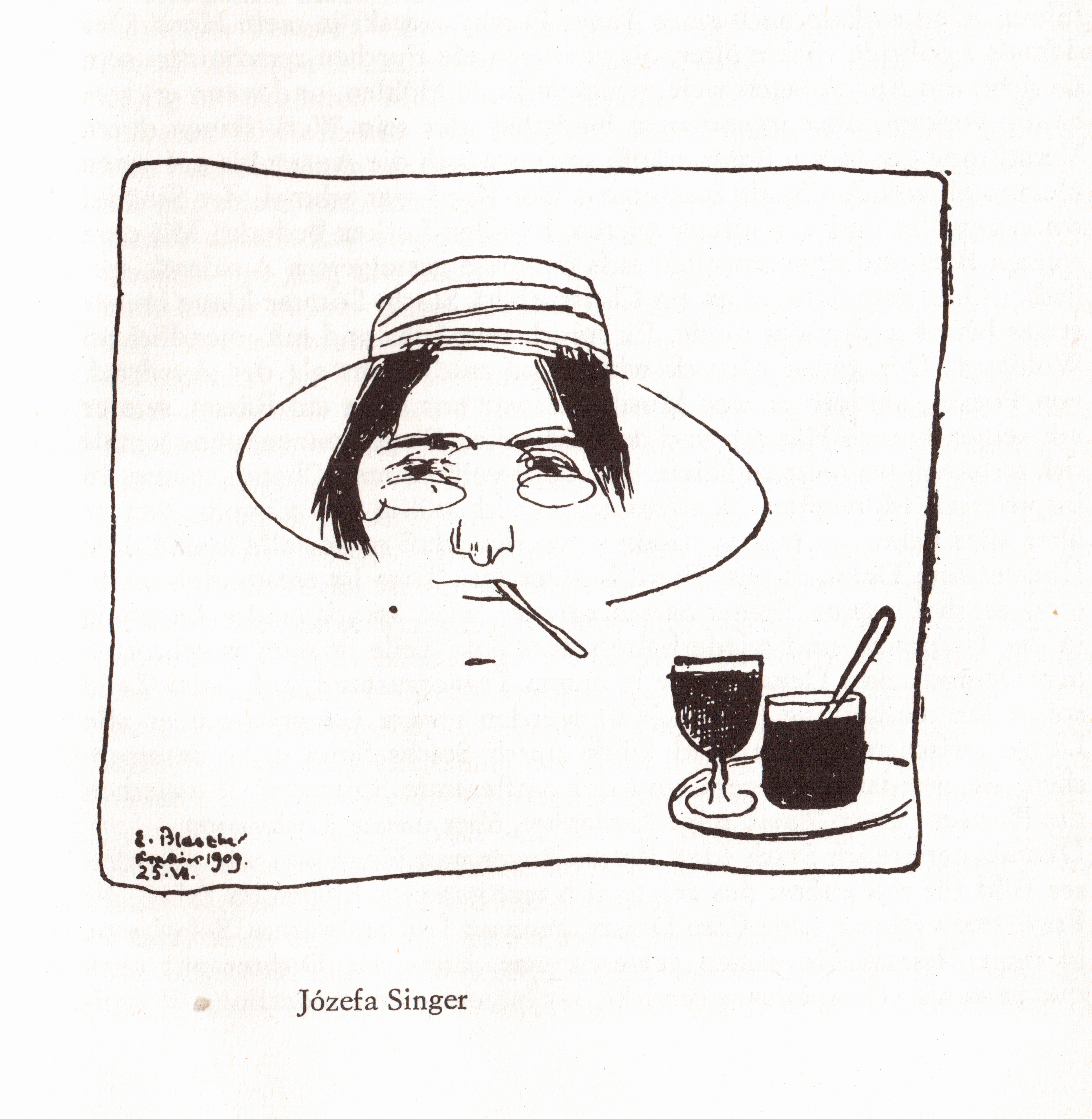 Karykatura Józefy Singer